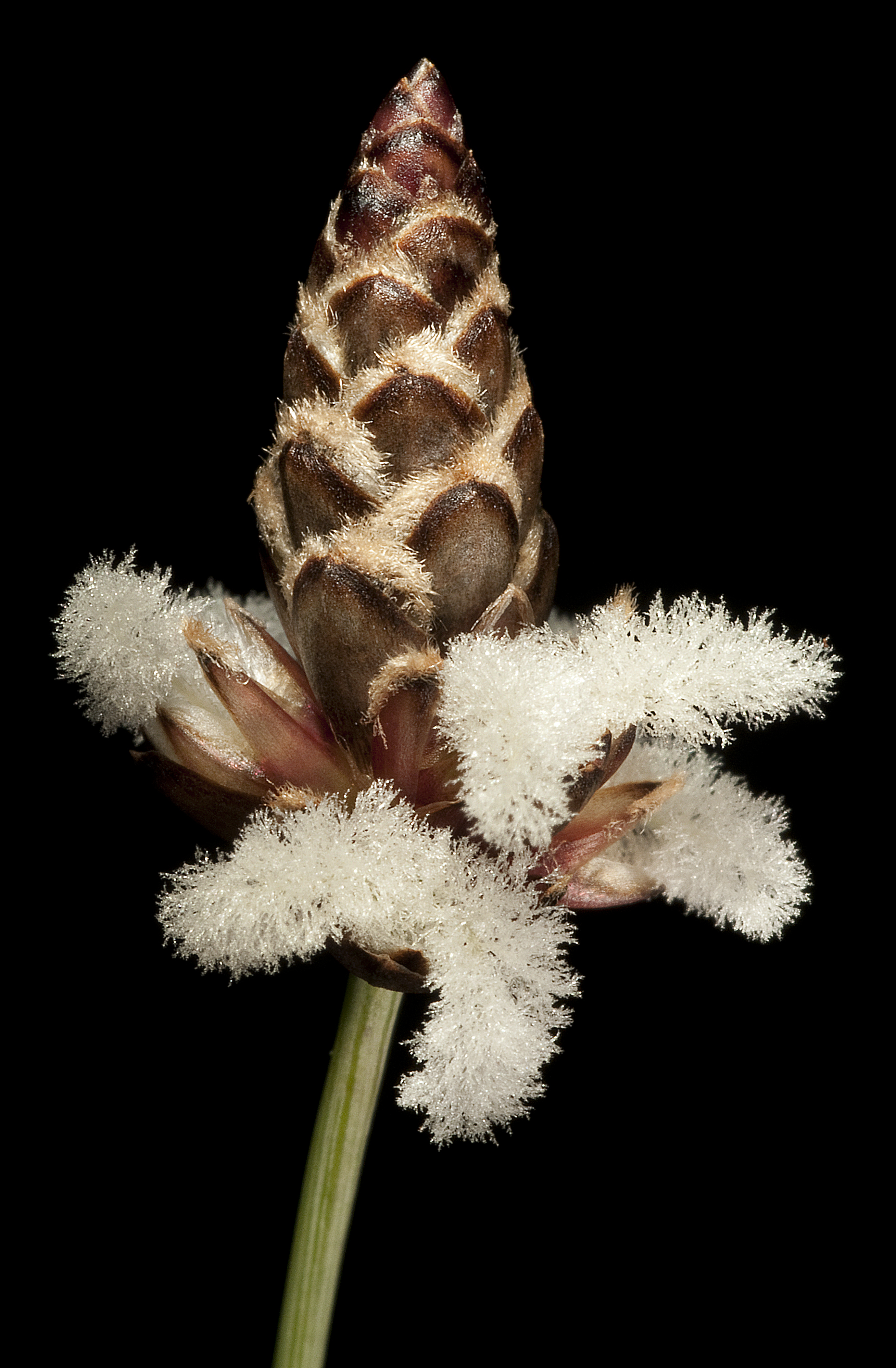 KRT4224